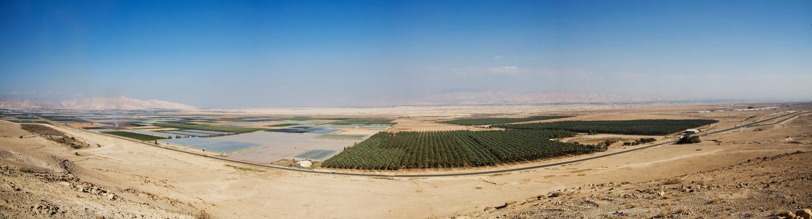 מטע התמרים של נערן